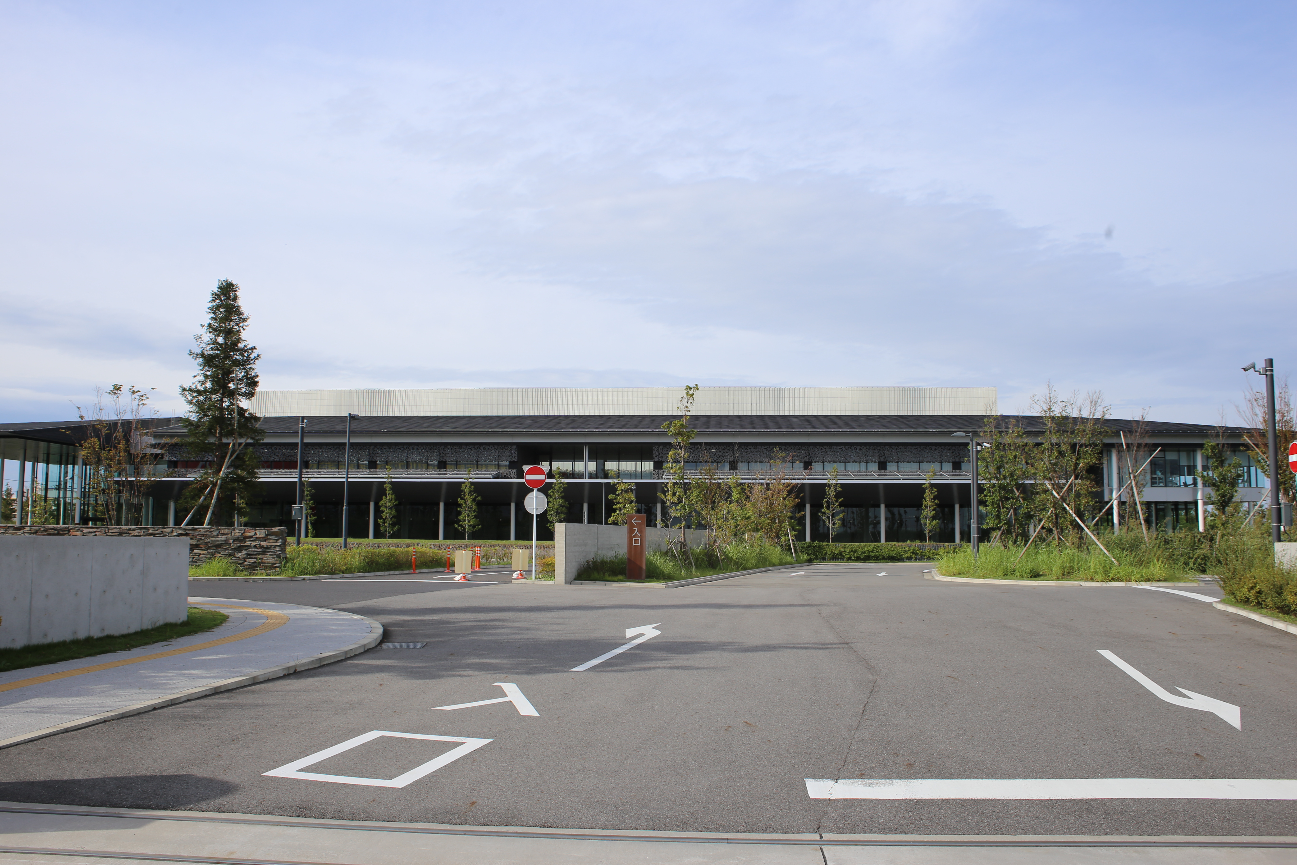 名古屋市港区東茶屋三丁目の名古屋市立第二斎場